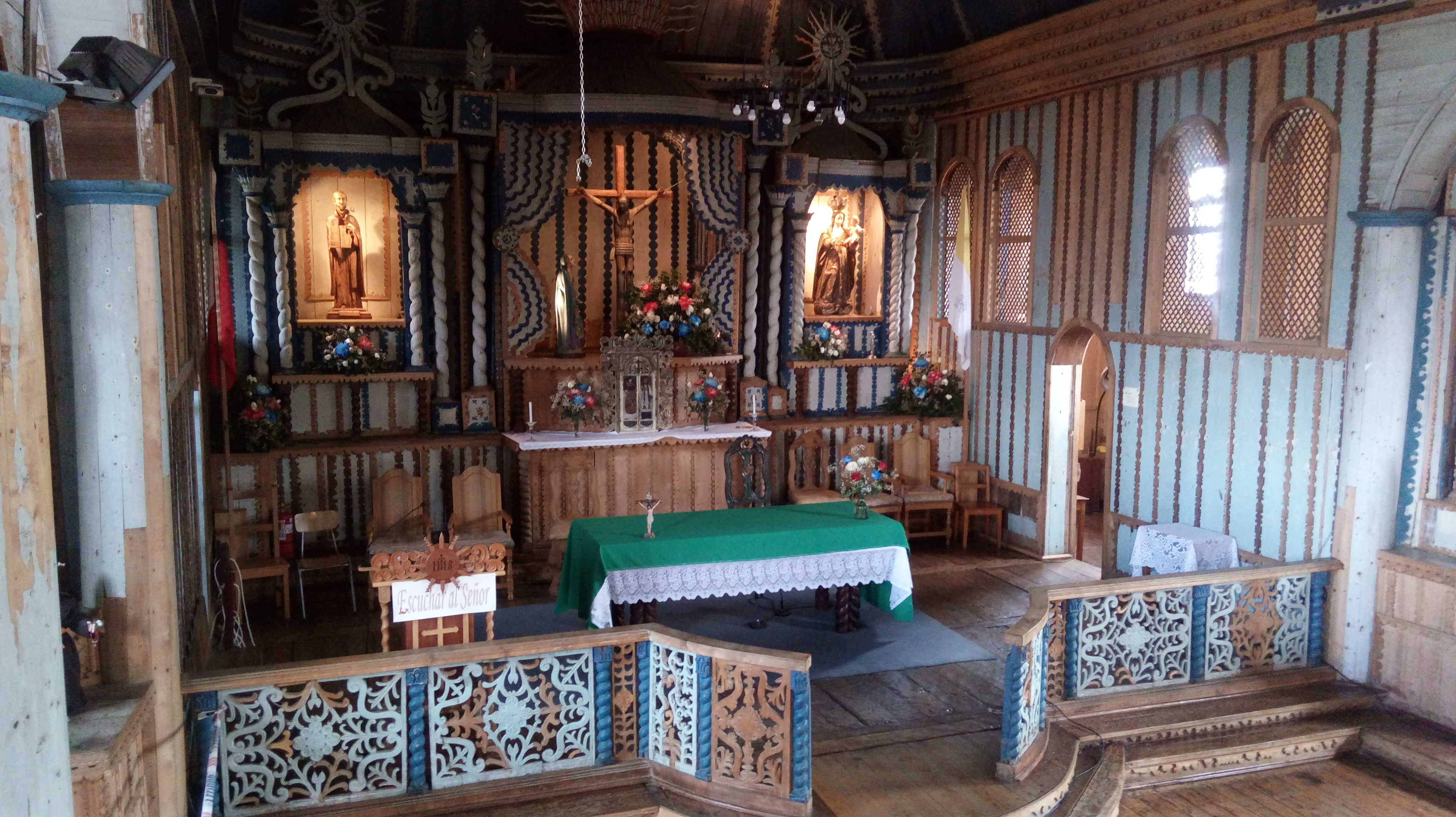 Interior iglesia